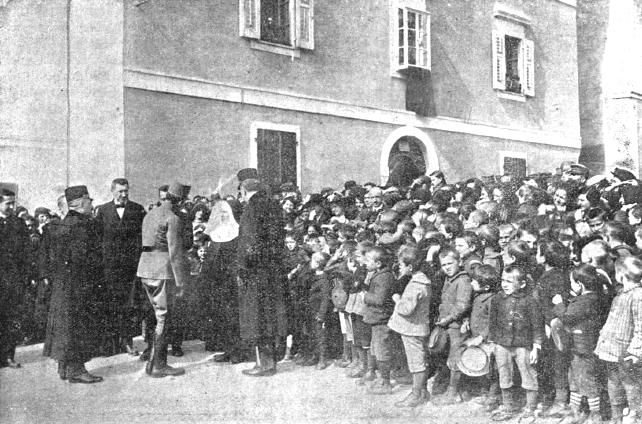 Cesar Karl v Bujah